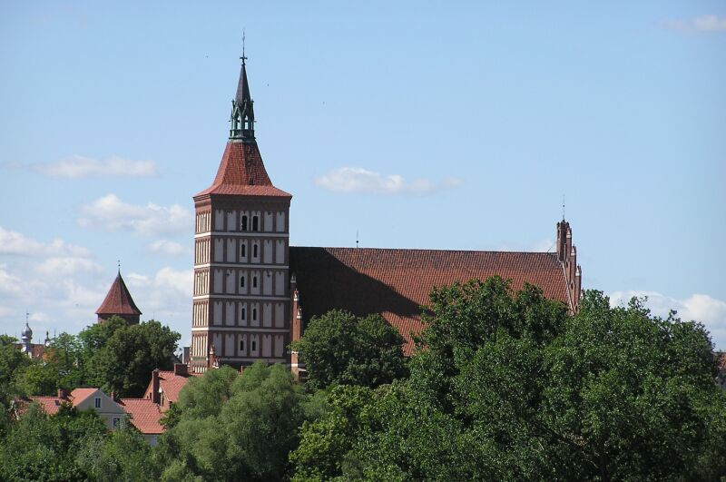 cathédrale Saint Jacques - Olsztyn, Pologne.